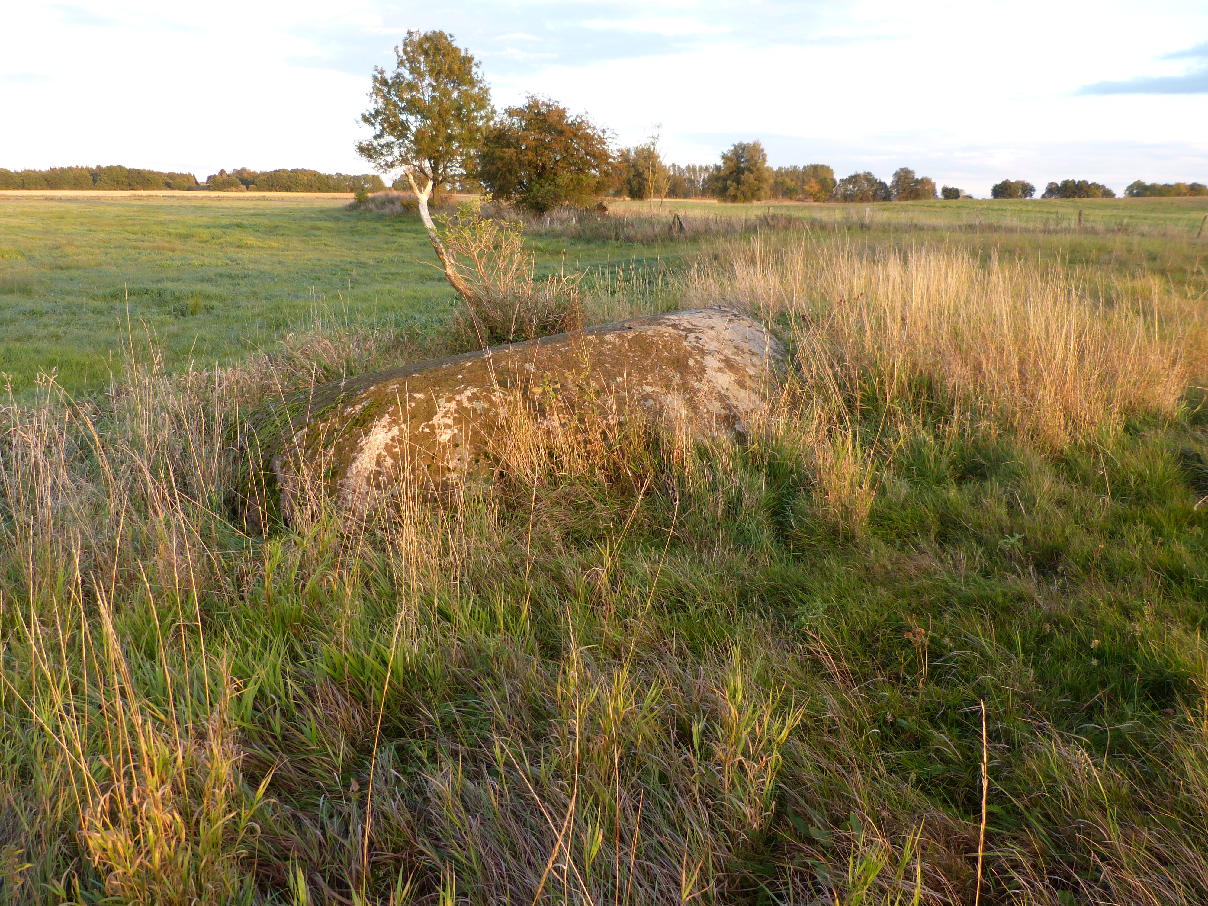 Großer Findling Neu Dargelin, Ansicht von Westen